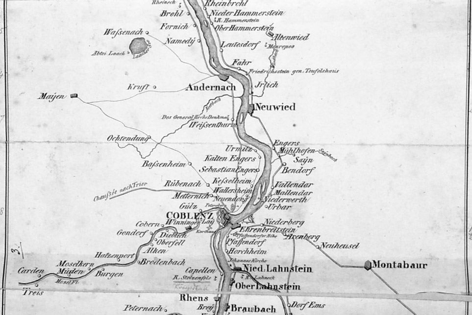 Mittelrhein